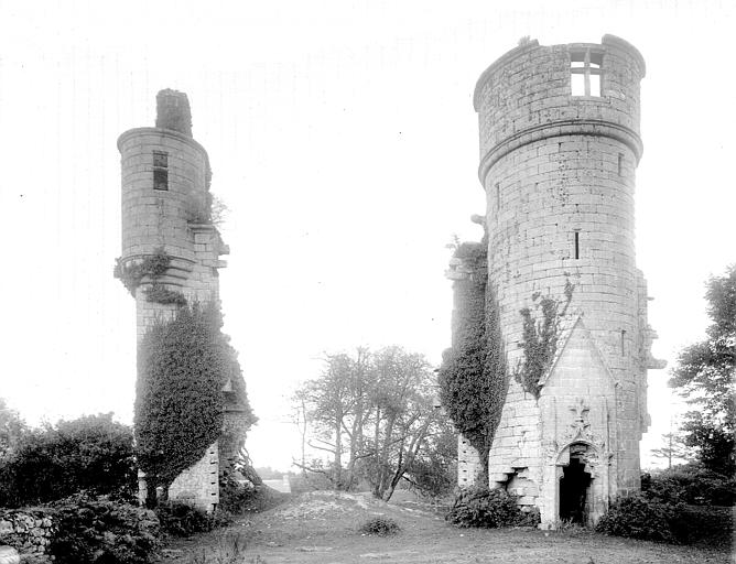 Le château de Rustéphan à Pont-Aven, photographié par Eugène Lefèvre-Pontalis.